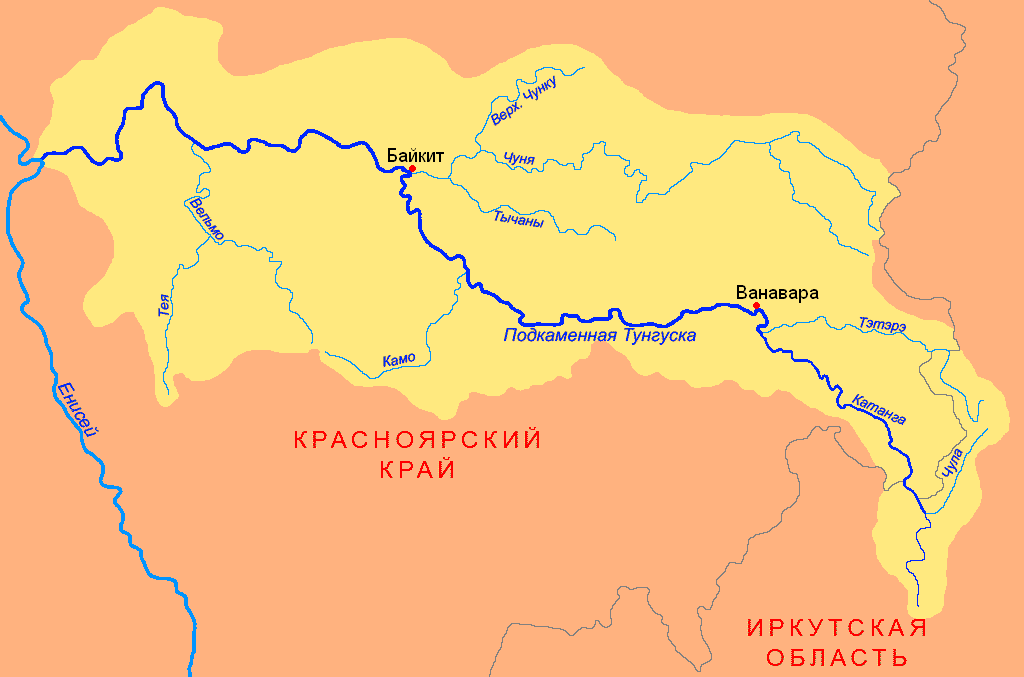 Схема бассейна реки Подкаменная Тунгуска